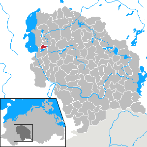 Godern in Mecklenburg-Vorpommern - District Parchim